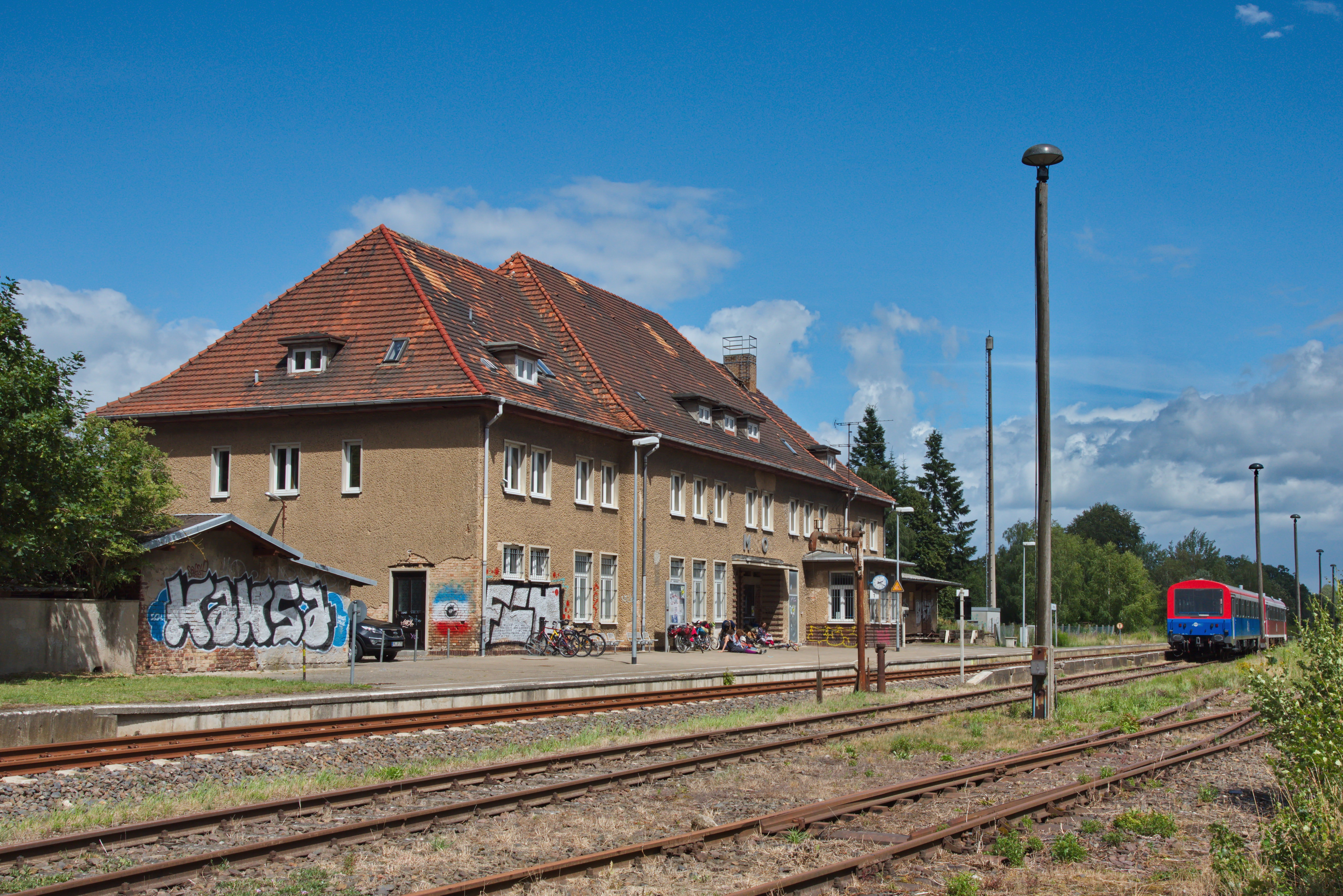 Blick auf das Empfangsgebäude vom Bahnhof Mirow.